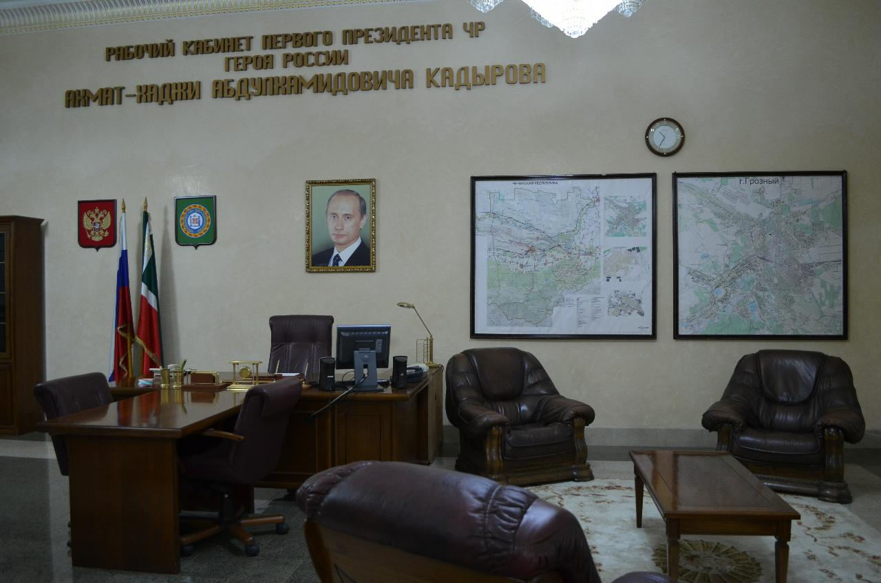 Грозный, Чеченская республика, 26.06.2019. Автобусная экскурсия из Пятигорска